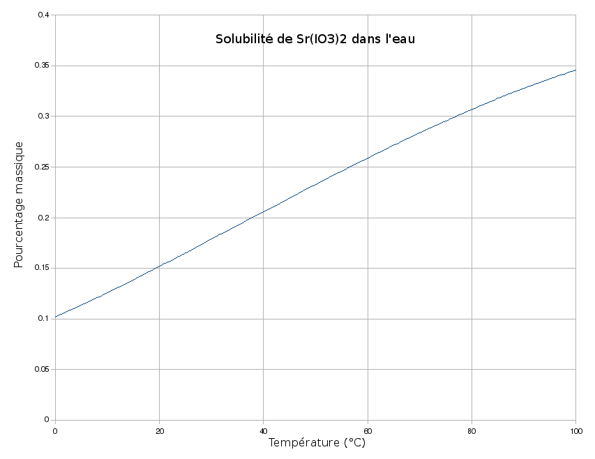 Solubilité de Sr(IO3)2 dans l'eau en fonction de la température.